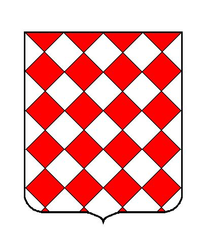 armes Turpin de Crissé